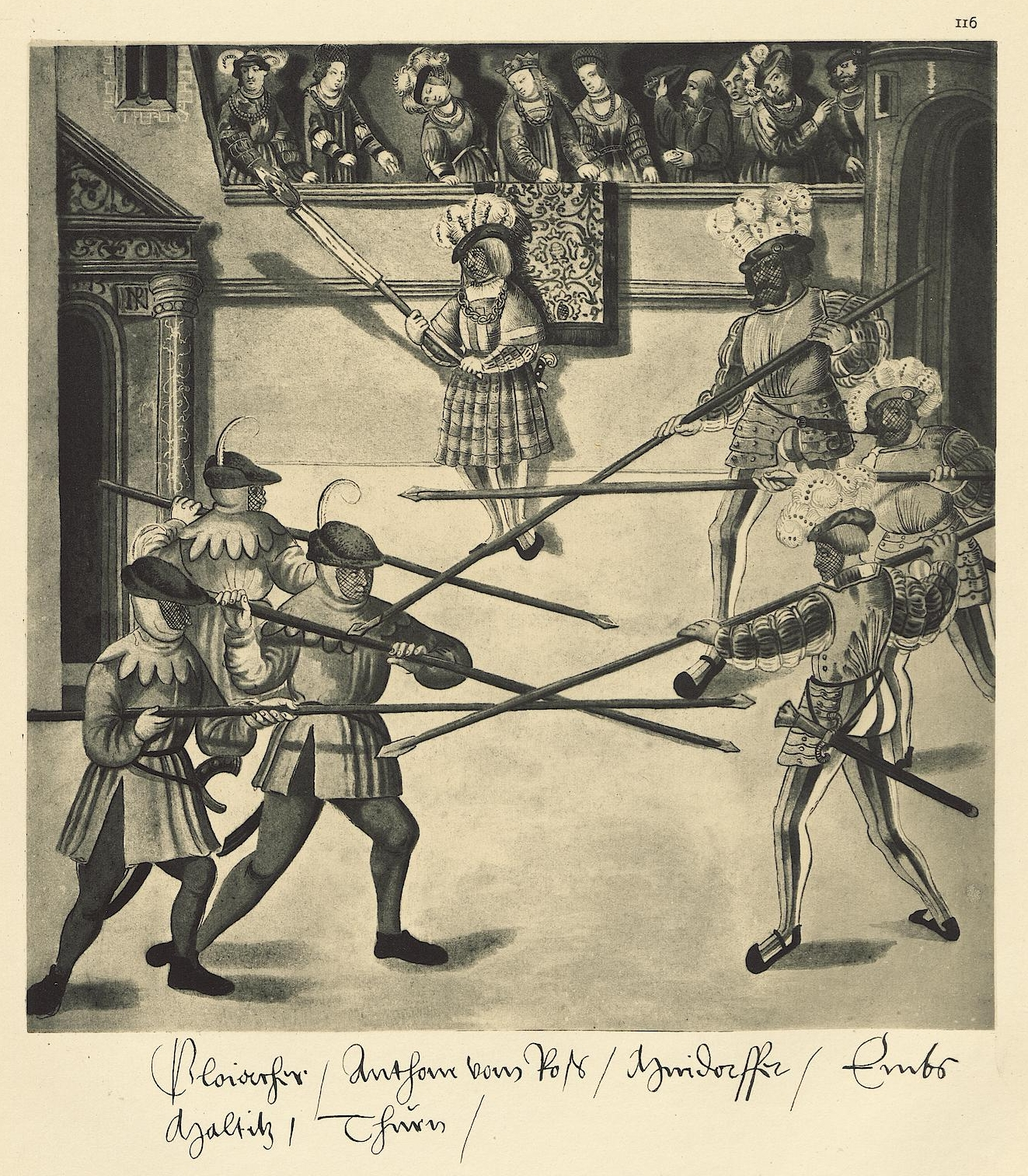 Tafel aus: Freydal: des Kaisers Maximilian I. Turniere und Mummereien; mit einer geschichtl. Einleitung. Tafeln. Wien, 1882. Exemplar der UB Tübingen. (Faksimileedition des Turnierbuchs Freydal, Kunsthistorisches Museum Wien, Signatur: K.K. 5073) Tafel 116 Gloiacher, Anthoni vom Ross, Mindorffer, Embs, Maltitz, Thurn